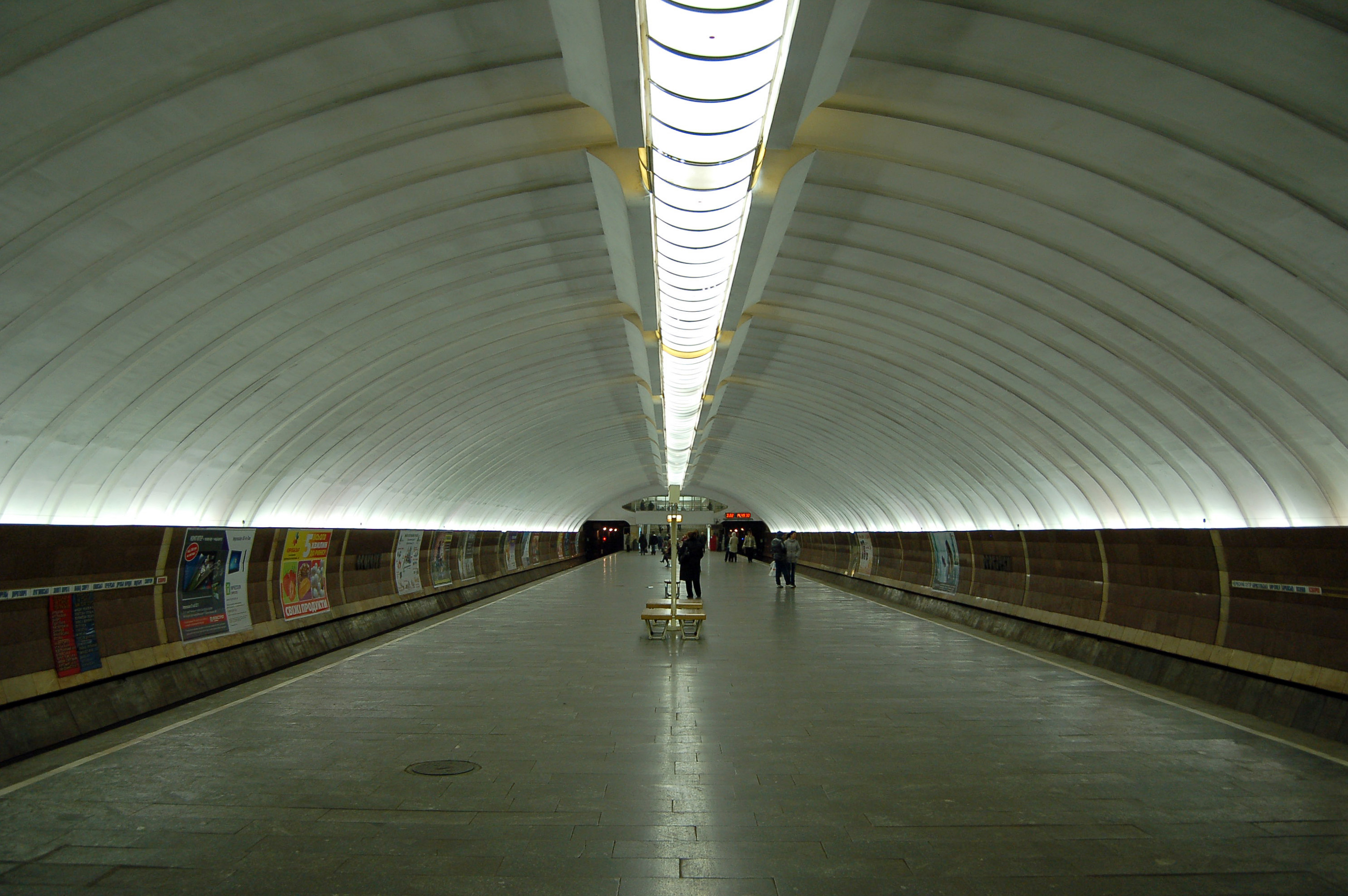 Cтанция метро «Осокорки», пассажирская платформа